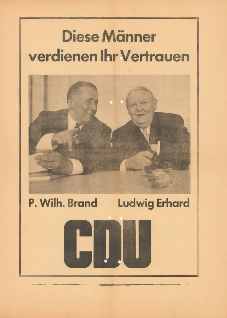 Diese Männer verdienen Ihr Vertrauen P. Wilh. Brand Ludwig Erhardel CDUAbbildung:Foto von Brand zusammen mit Ludwig ErhardPlakatart:Kandidaten-/Personenplakat mit PorträtObjekt-Signatur:10-031 : 815Bestand:CDU-Plakate (10-031)GliederungBestand10-18:PersonenplakateLizenz:KAS/ACDP 10-031 : 815 CC-BY-SA 3.0 DE